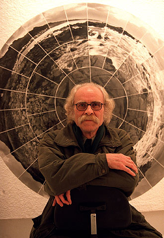 Adolfo Schlosser delante de su composición fotográfica